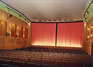 Zeigt den Saal des CINEMA Kinos in München